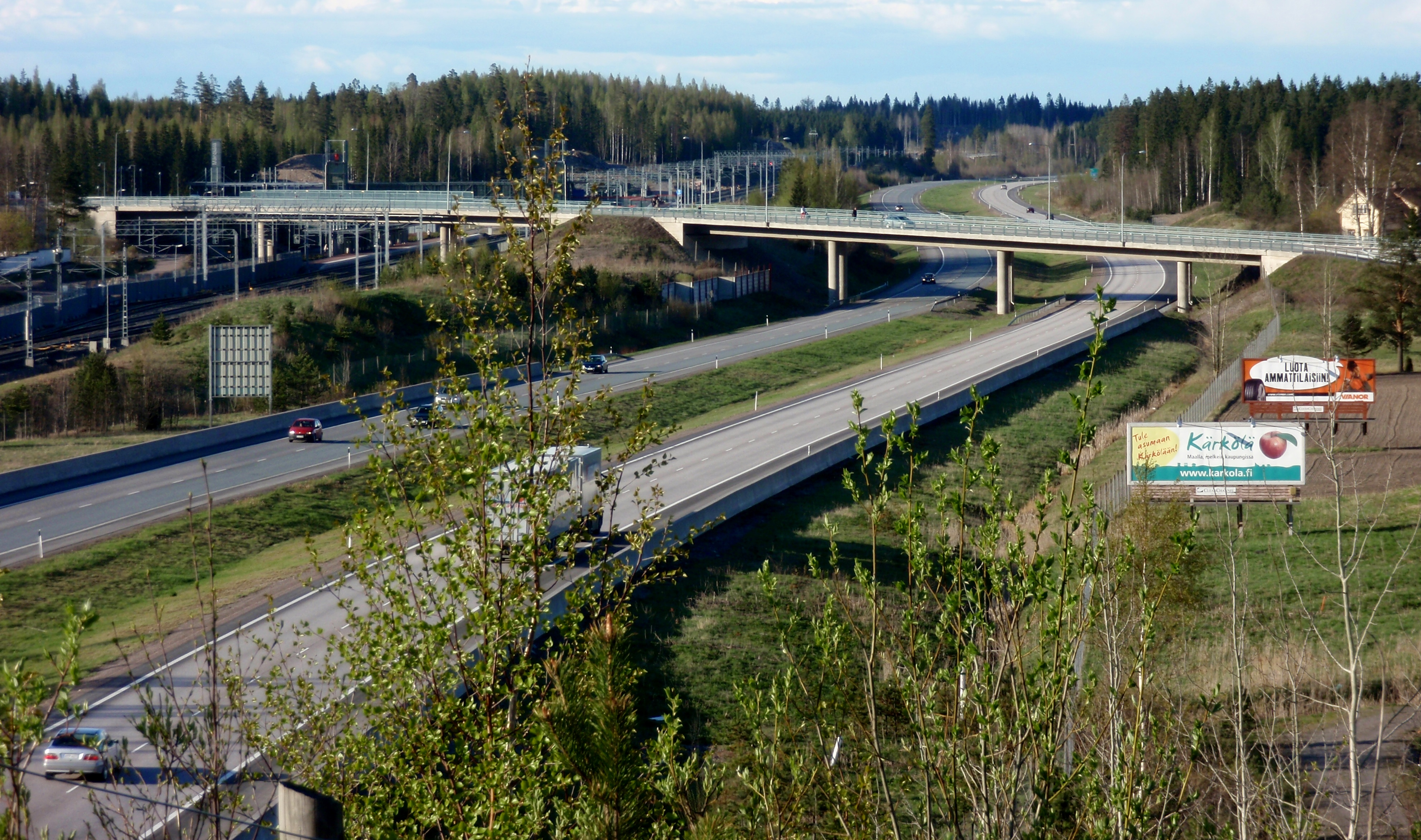 Mäntsälä Lahden moottoritien kohdalta